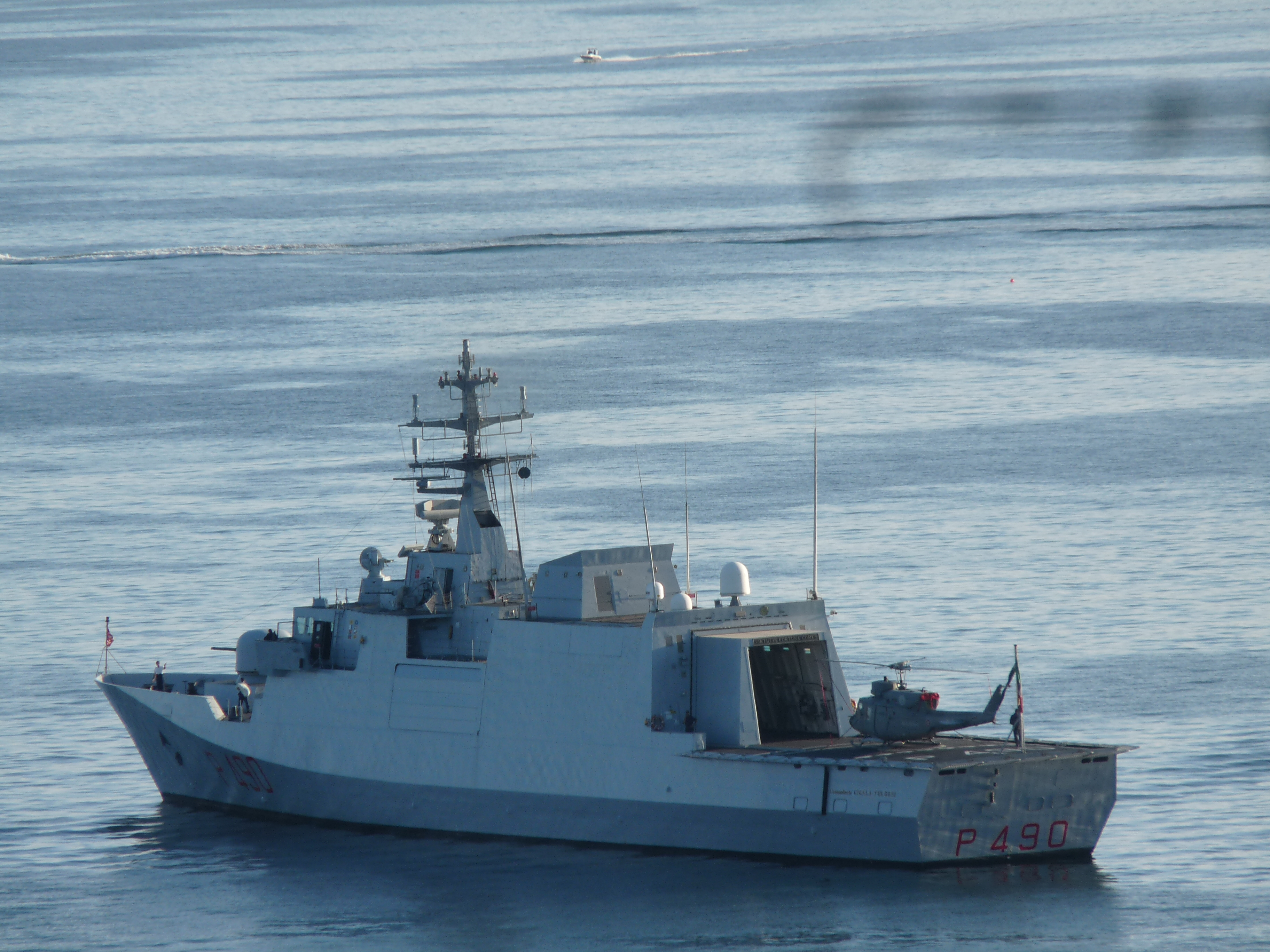 Pattugliatore classe Comandanti alla fonda a Napoli